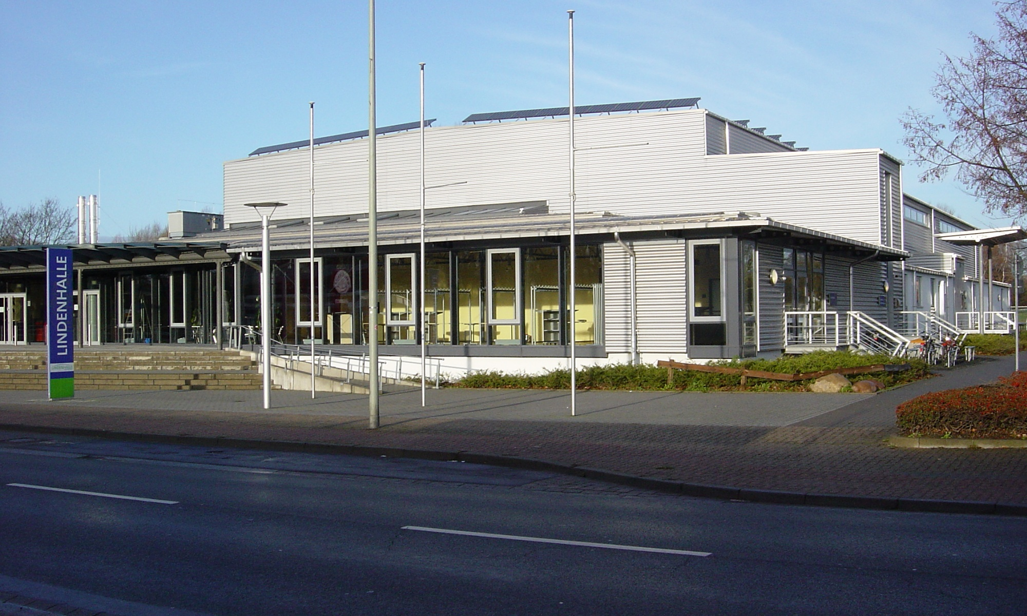 Lindenhalle Wolfenbüttel, Halberstädter Str. 1a, 38300 Wolfenbüttel